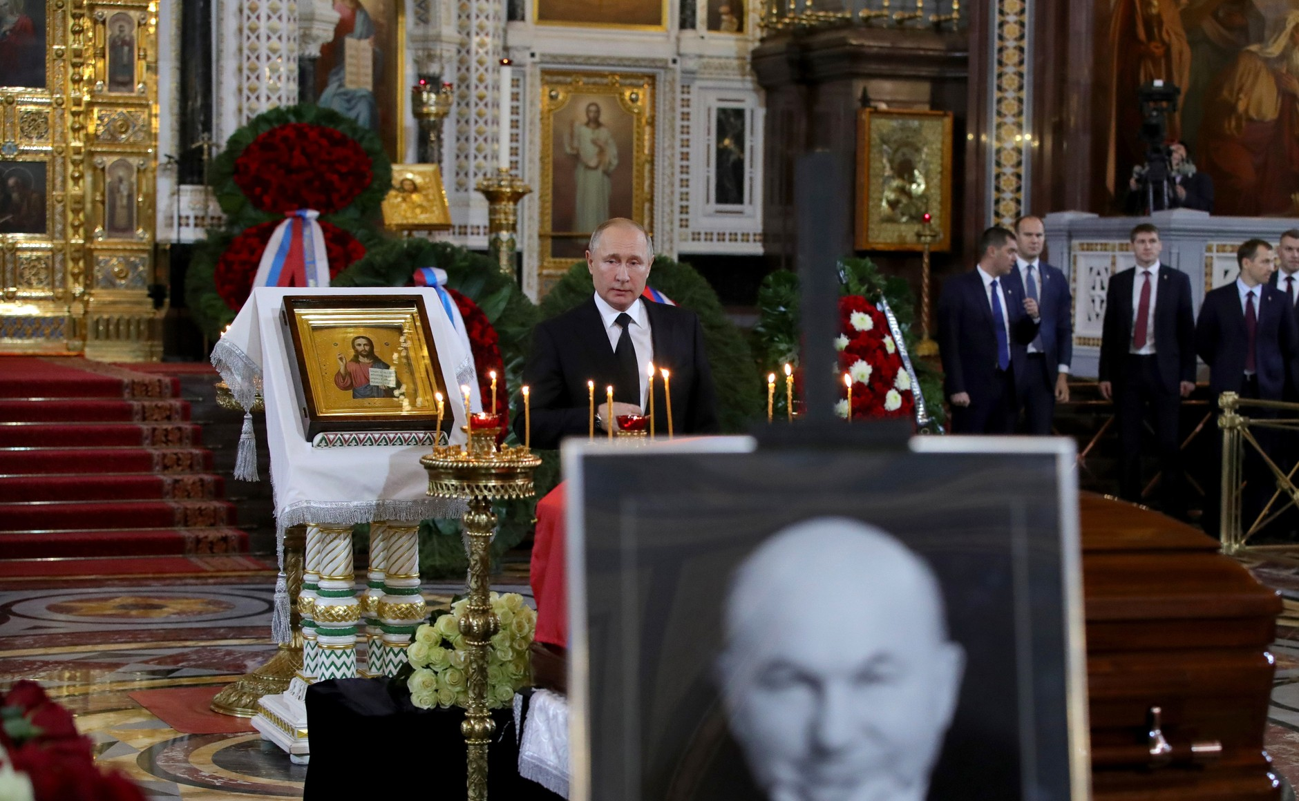 На церемонии прощания с бывшим мэром Москвы Юрием Лужковым в храме Христа Спасителя